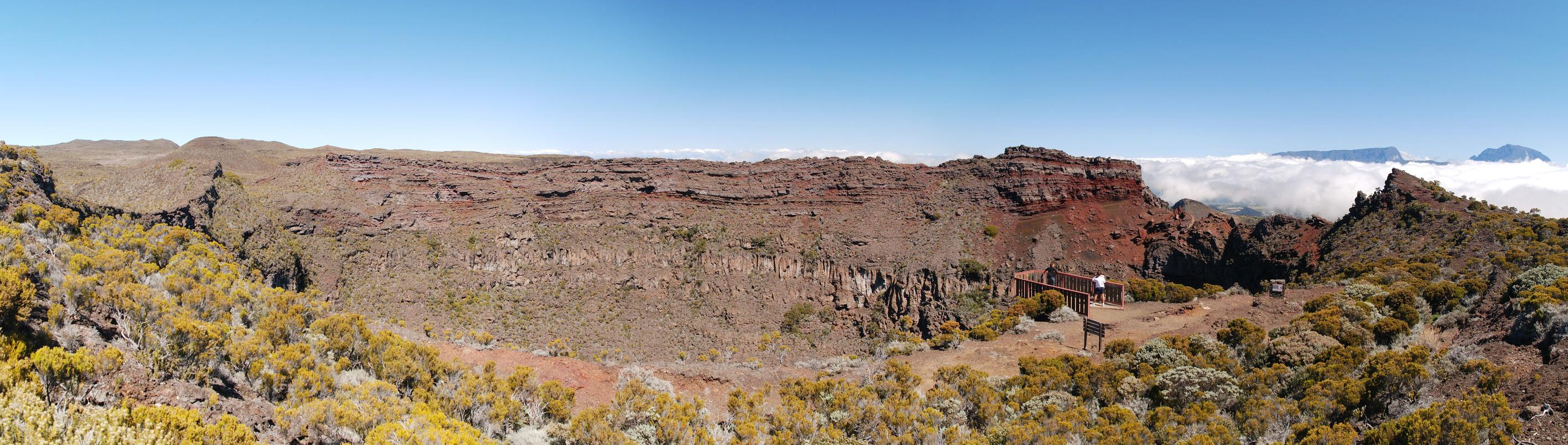 cratère Commerson